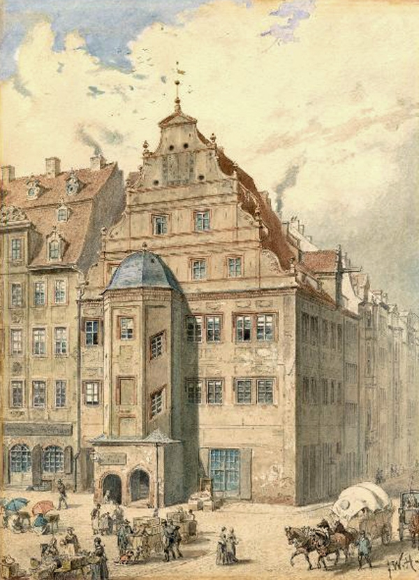 Die Alte Waage in Leipzig. Zustand um 1850